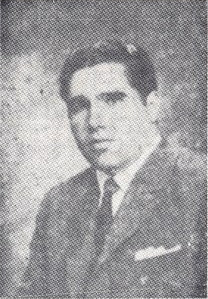 Fotografía del payador uruguayo Juan Carlos Bares "el indio", aparecida en la revista argentina "Rincón del Payador" nº4, en setiembre de 1980.